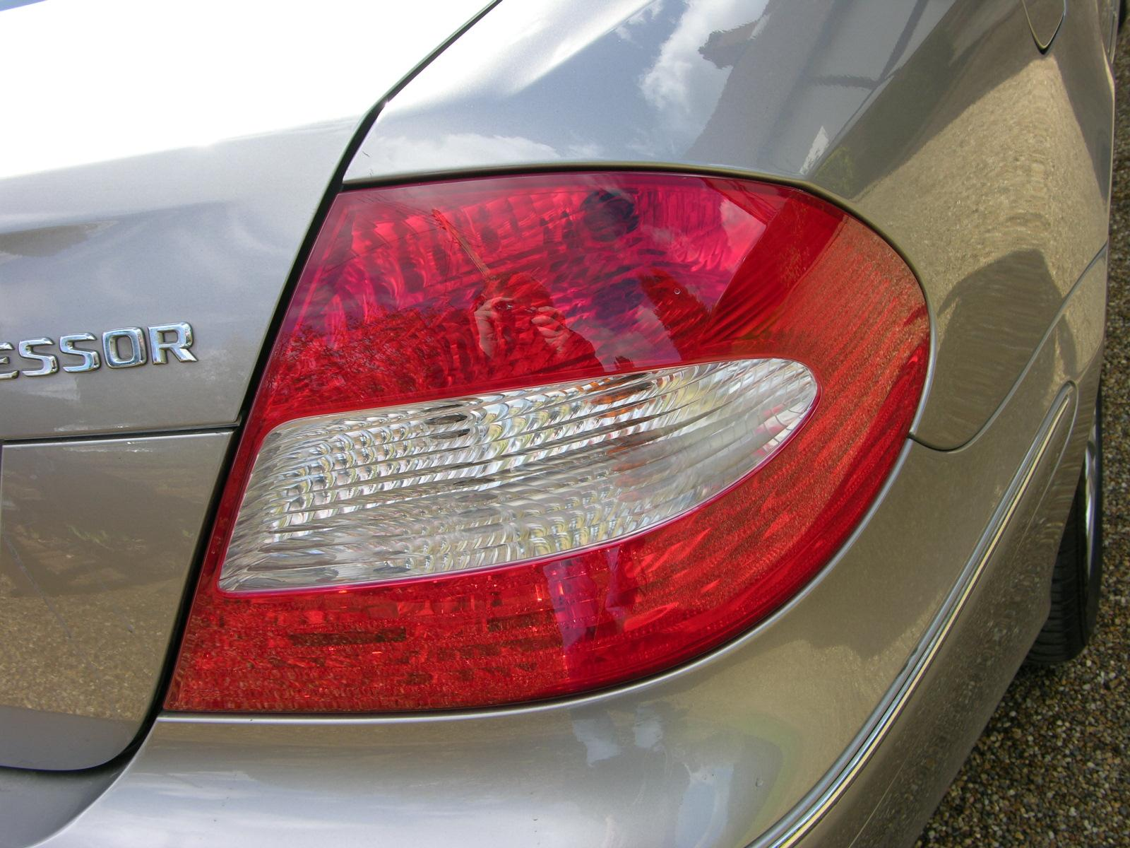 Mercedes Benz CLK 200 Kompressor